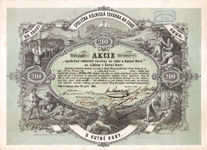 Diese zu einer der schönsten Zuckeraktien der Welt gewählte Gründeraktie Nr. 865 über einen Anteil von 200 Złoty des Unternehmens Spolecna Rolnicka Továrna na Cukr u Kutné Hory (Etwa: Vereinigte Landwirtschaftliche Zuckerfabrik in Kuttenberg; tschechisch: Kutná Hora), von dem 1991 lediglich 5 Stücke "gefunden" worden waren, als Lithographie mit mehreren illustrierenden Ansichten aus der Werkstatt von Mittag & Wildner in Prag. Die 1864 gegründete Kuttenberger Unternehmen lag rund 70 km östlich von Prag und 7 km südlich der Elbe bei Kolin. Der Ort erhielt zwar 1870 einen Eisernbahn-Anschluss, durch den es zu einer verhaltenen Industrialisierung kam, allerdings ging die Zuckerfabrik ab dem 2. Mai 1874 mit einem Aktienkapital von 203.000 Gulden in Konkurs. Eine der wiedergefundenen Gründeraktien wurde zuletzt 2015 zu einem Schätzpreis von 6.000 Euro unter gutkowski.de ausgerufen ... Mittag & Wildner